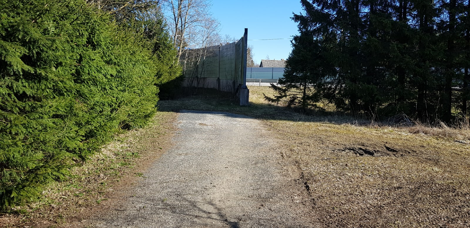 Mürasein, mis eraldab Ööbiku tee ja Tartu maantee